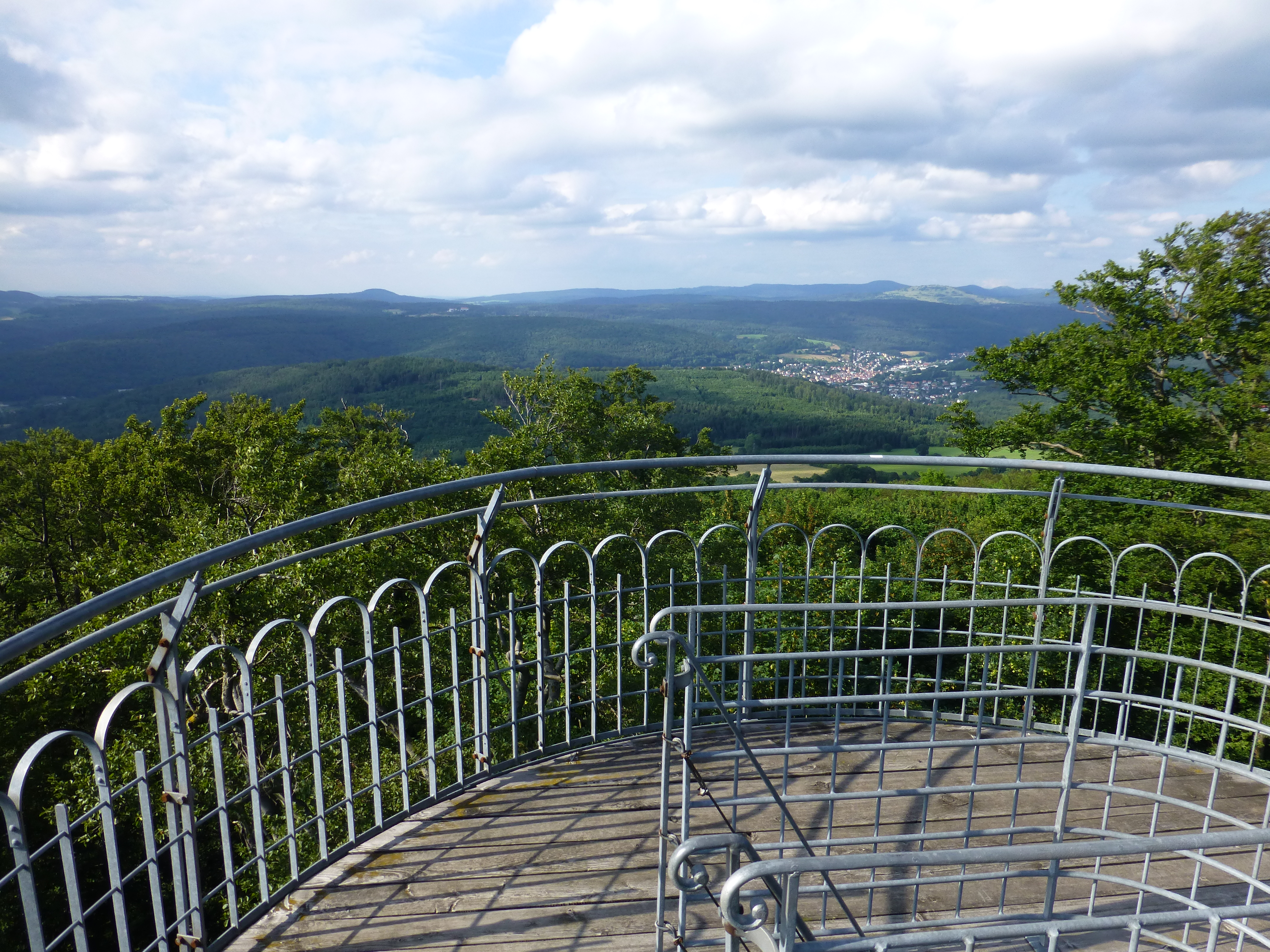 Aussichtsturm Dreistelzberg; Blick nach Norden in Richtung Bad Brückenau